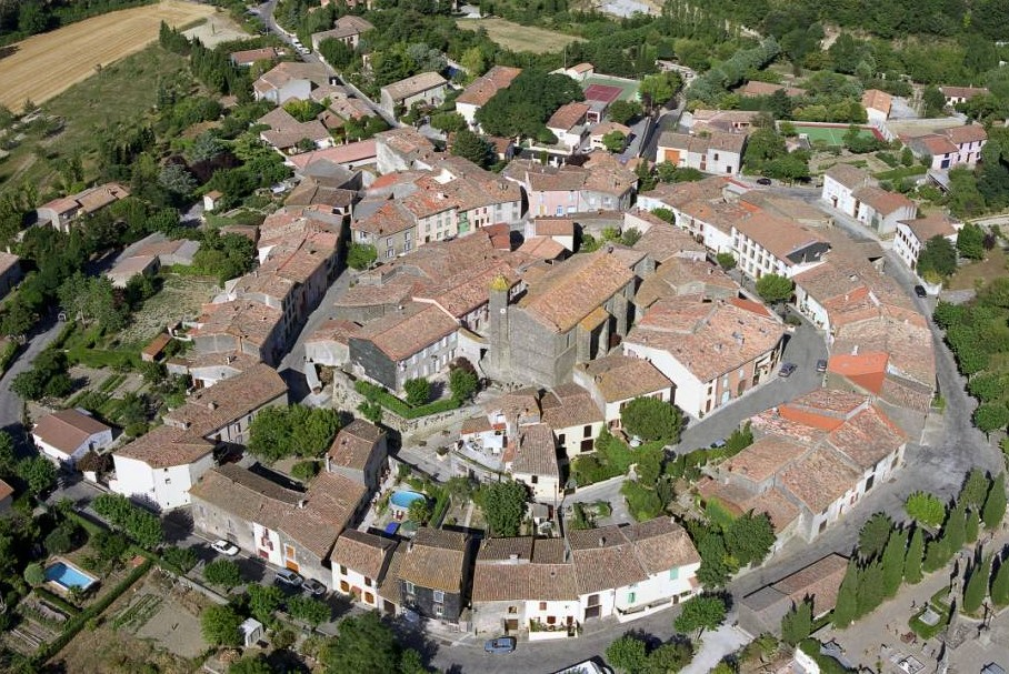 Vue aérienne de la circulade d'Alairac (11) prise à partir d'un ballon captif